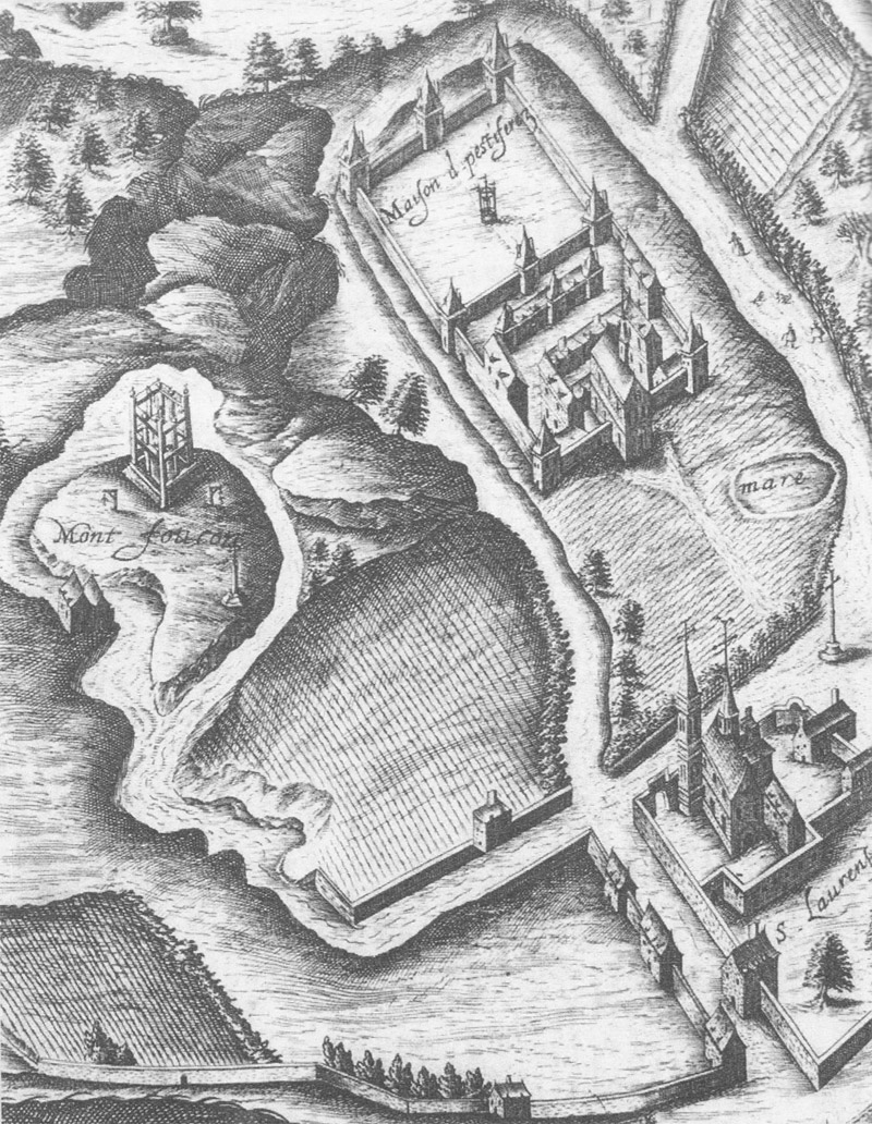 Gibet de Montfaucon avec l'église Saint Laurent et l'ancien Maison de Pestiférés (site de l'hôpital Saint-Louis) sur le plan de Vassalieu